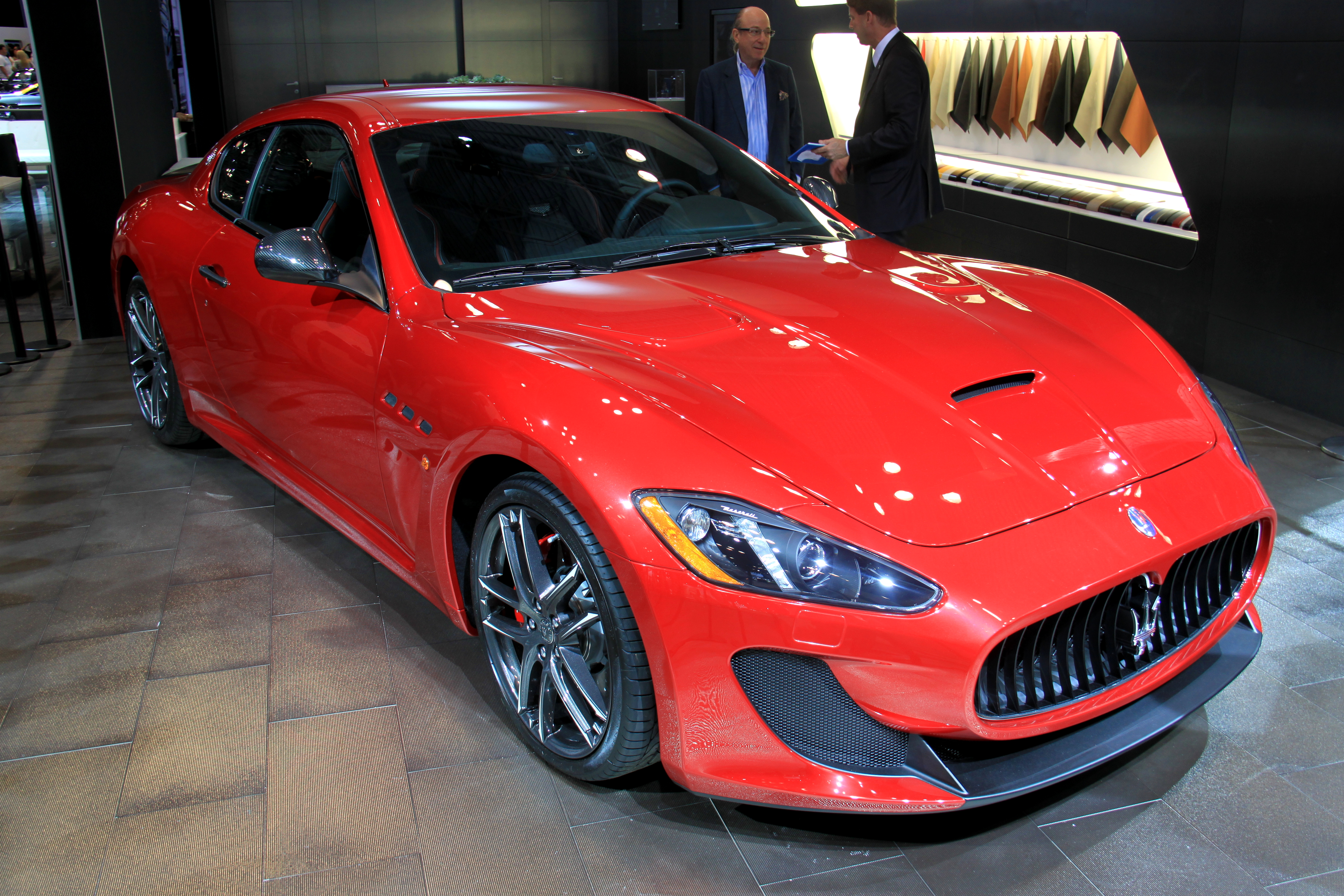 Maserati GranTurismo MC Stradale al Salone Internazionale dell'Automobile di New York Produzione: MODENA - ITALIA